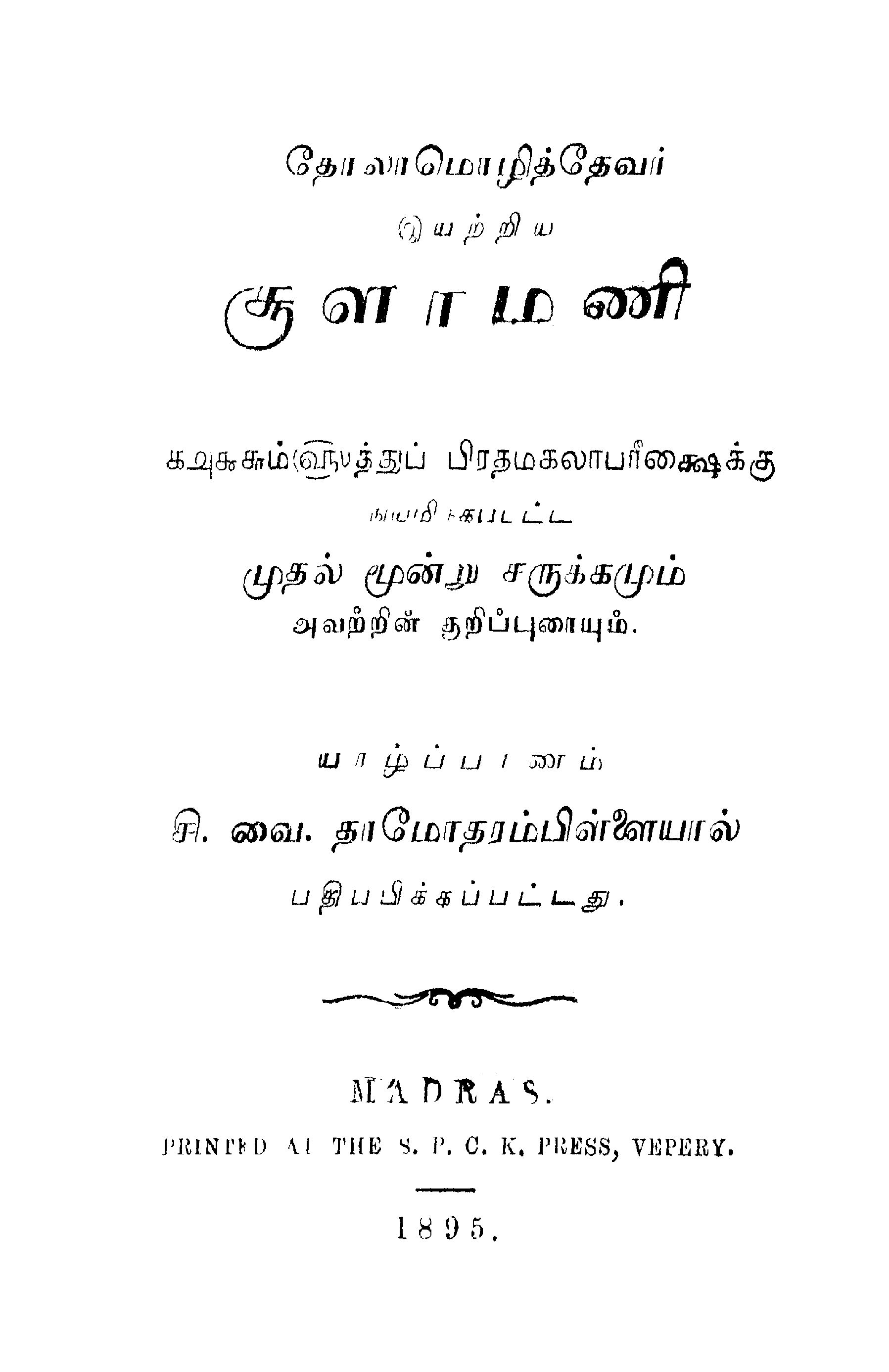 பகுப்பு:நூல் அட்டைகள்